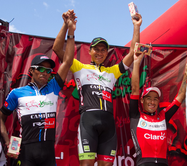 El podio final de la Vuelta a Chiriquí 2014. Et10. Vuelta a Chiriquí 2014 Circuito en David (84 Kms). Domingo 30 de noviembre de 2014